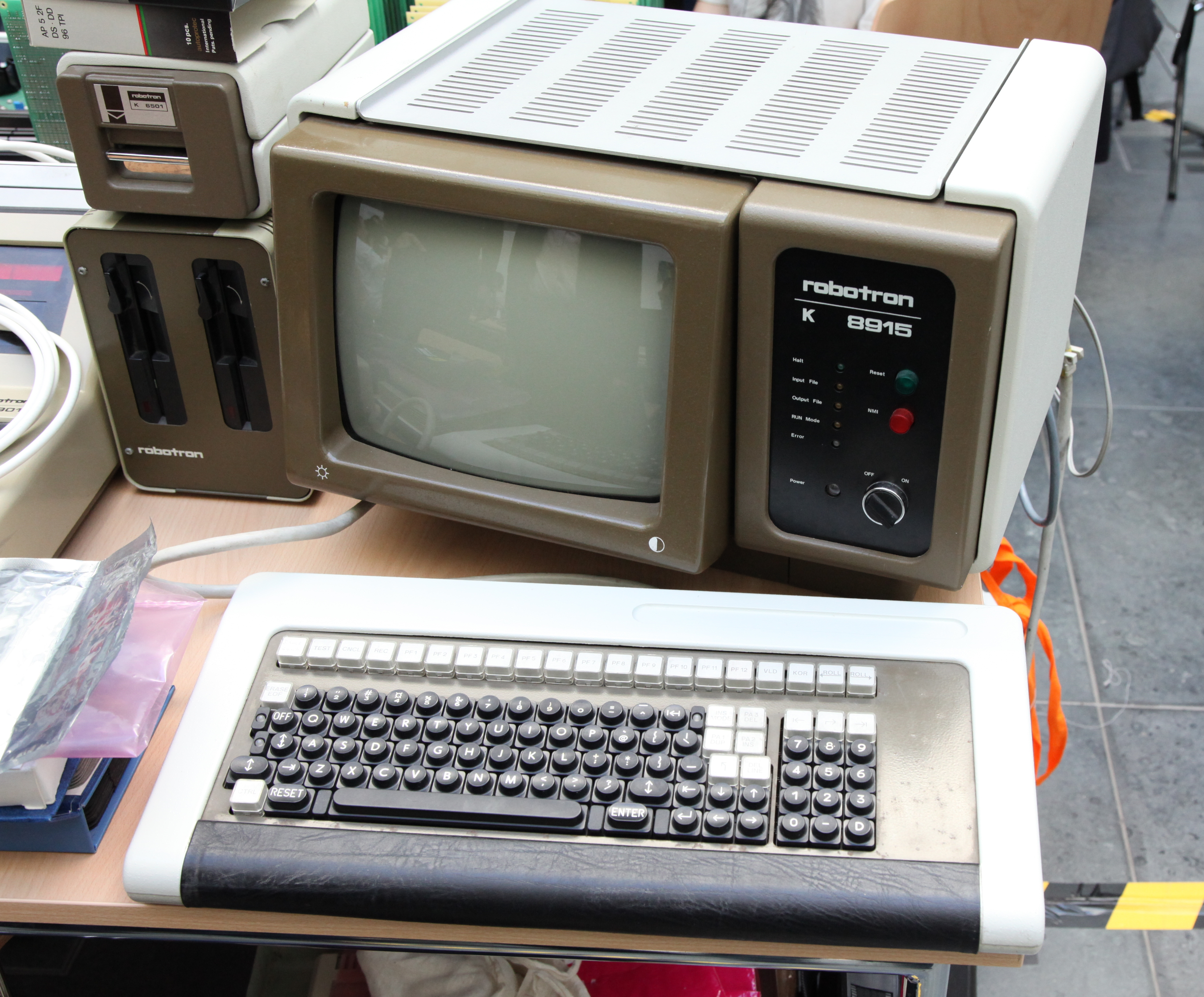 Robotron K8915 mit Diskettenlaufwerk und Magnetkartenleser